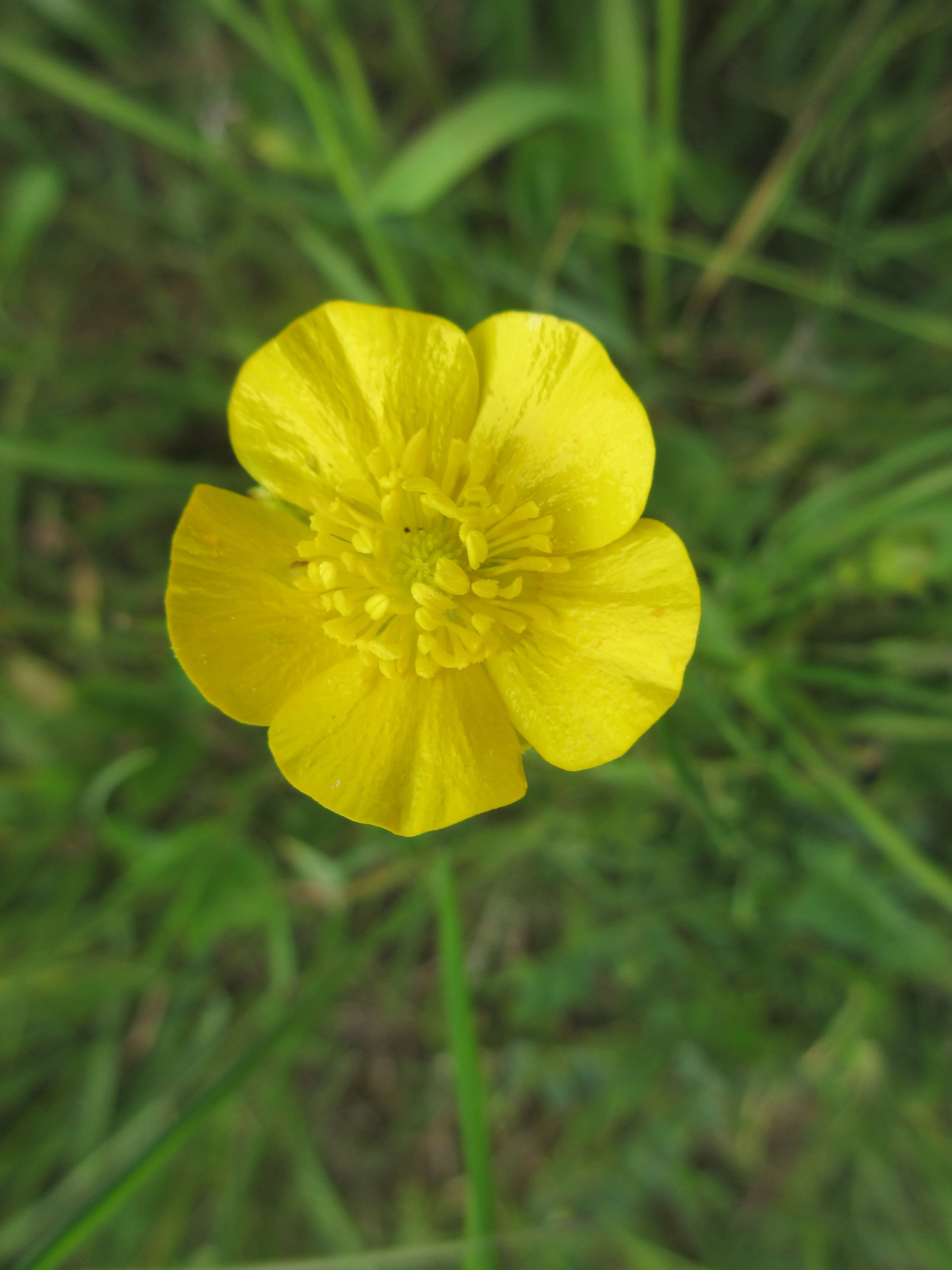 Ranunculus polyanthemos, Brno-Obřany, Czech Republic